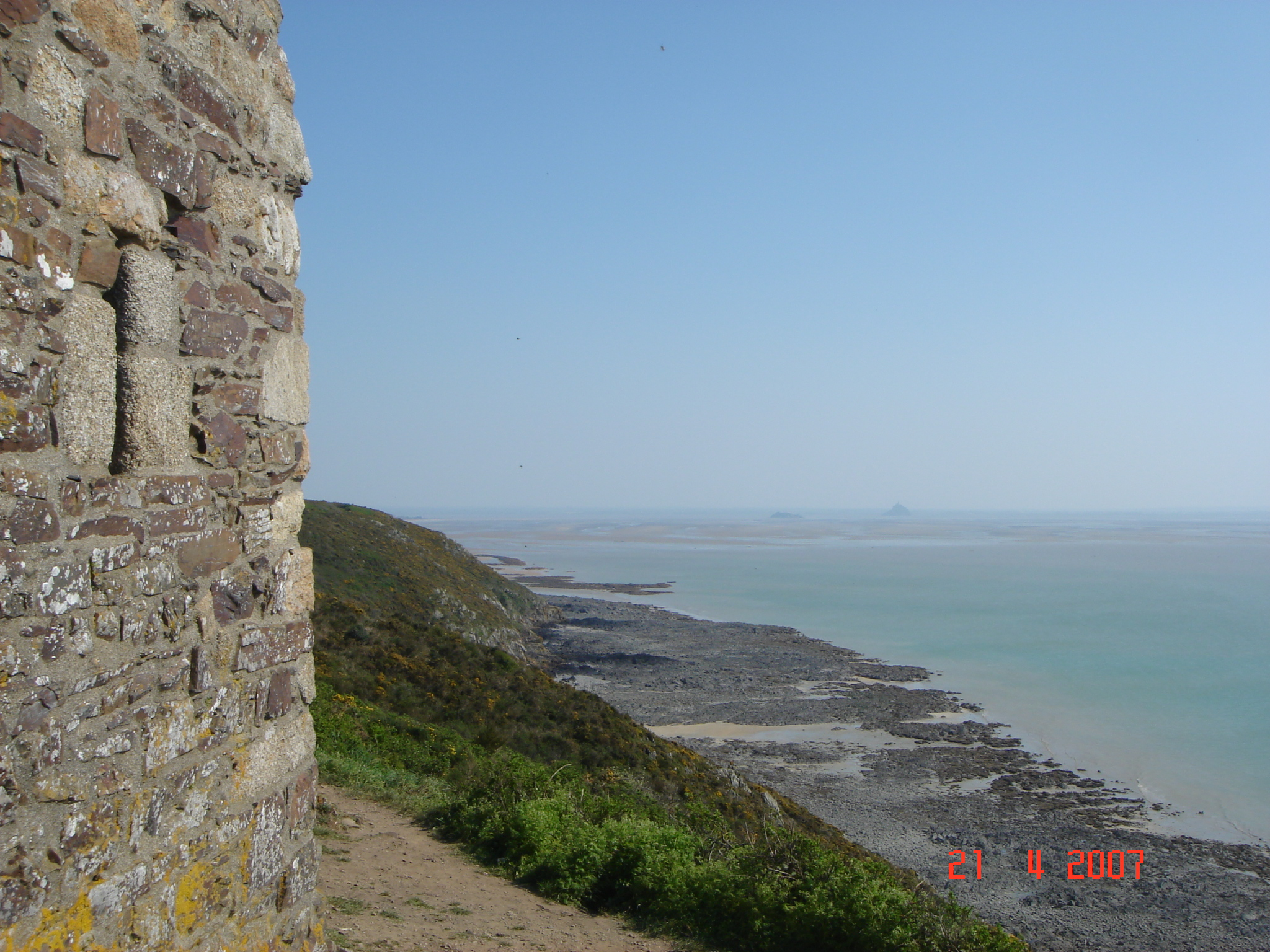 Carolles Cabanne Vauban vue Mont Saint michel